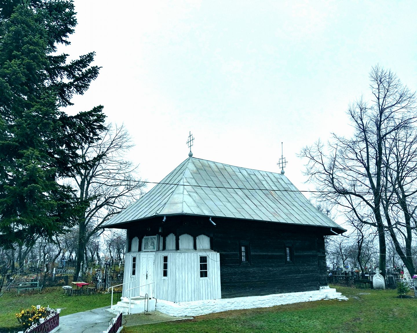 Biserica de lemn „Adormirea Maicii Domnului” a fostului schit Hârsova „Sf. Nicolae”